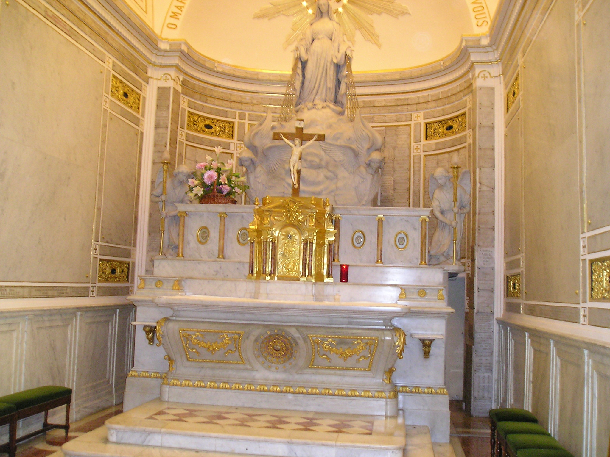 Description du contenu=Chapelle de la Médaille Miraculeuse, Autel 1 Source=« œuvre personnelle » Date=29-07-2006 Author=André Leroux Permission=œuvre personnelle,libre de droits(domaine public)